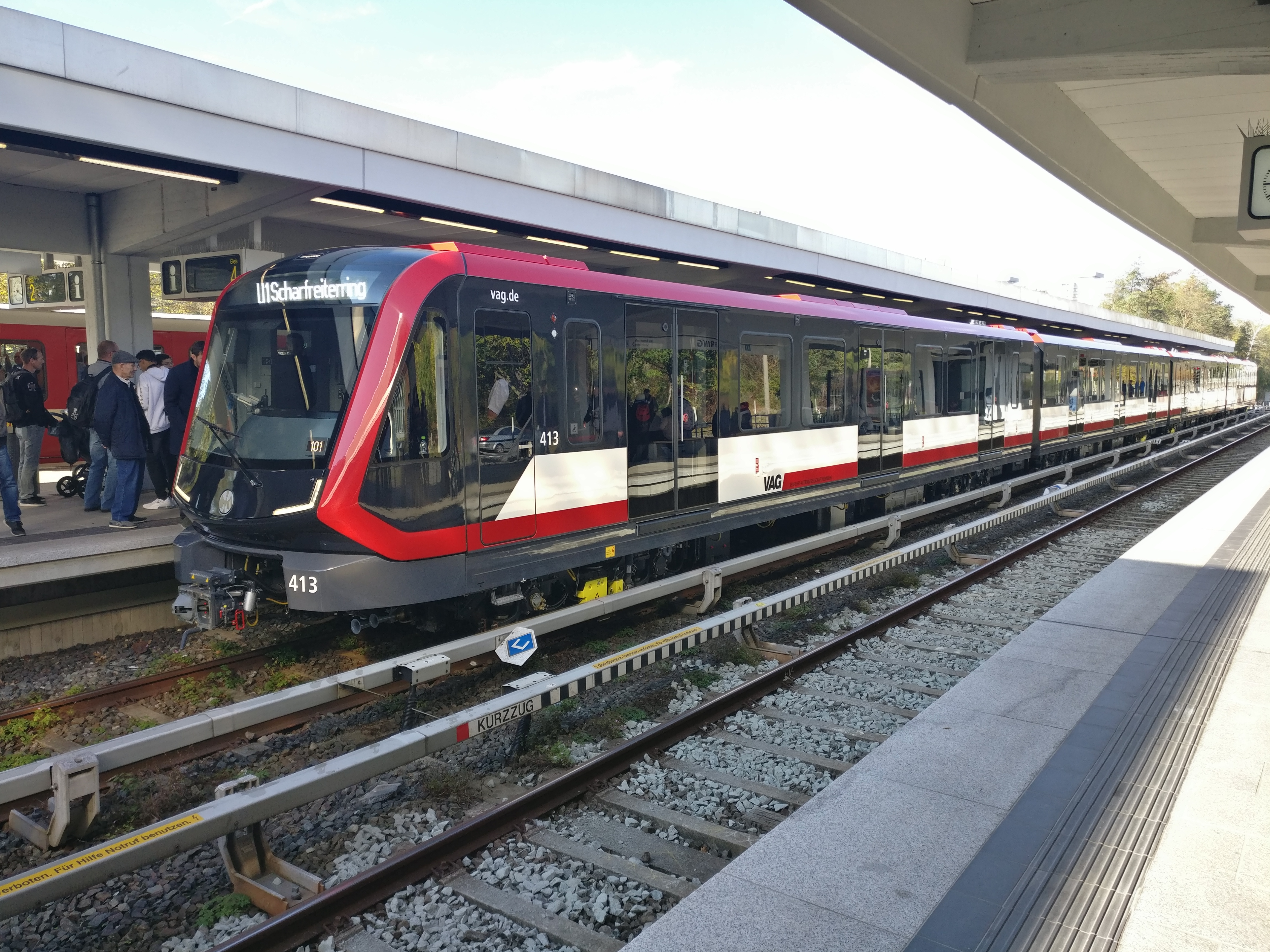 Ein Foto der G1